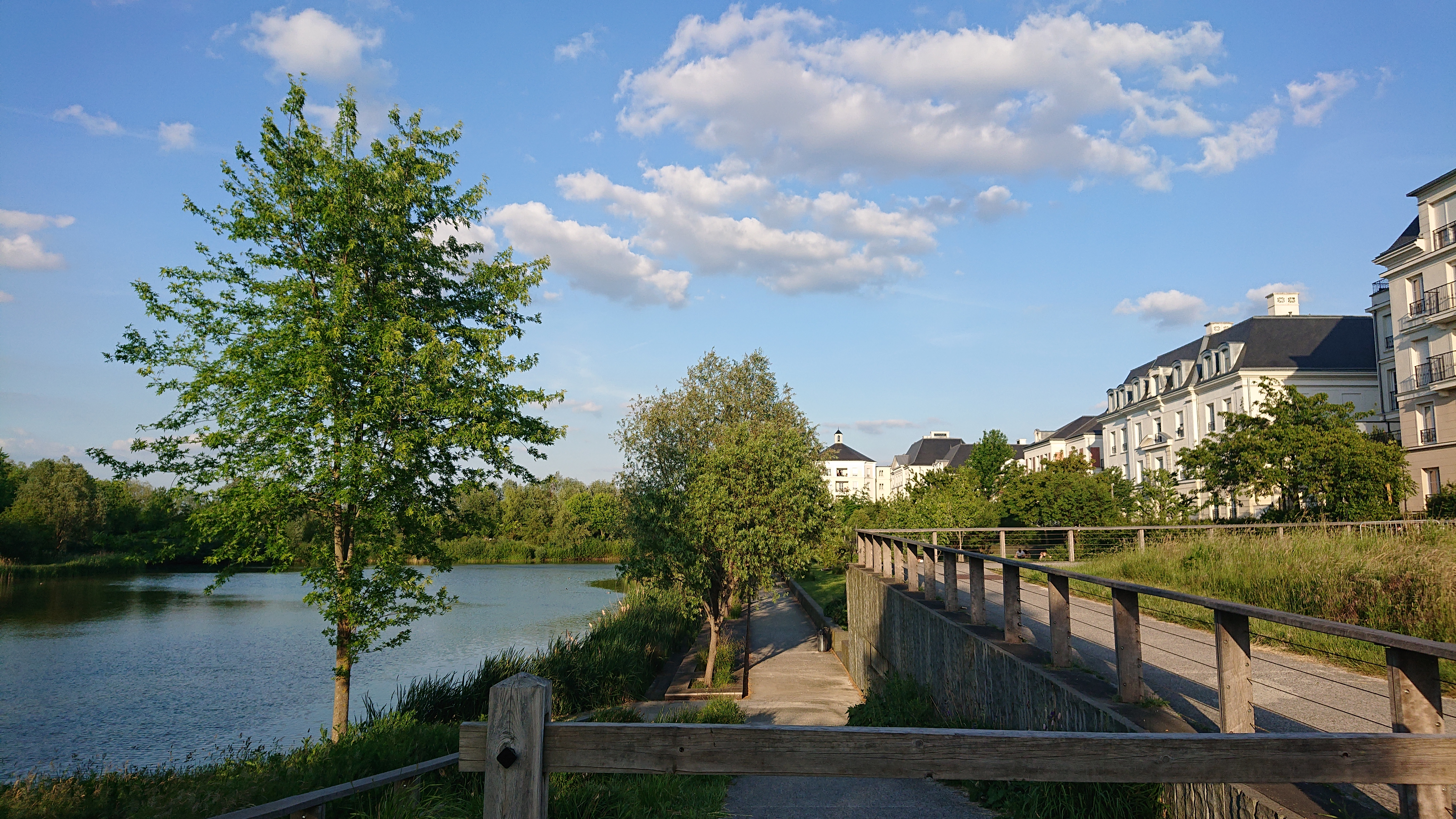 Lac de Serris 77